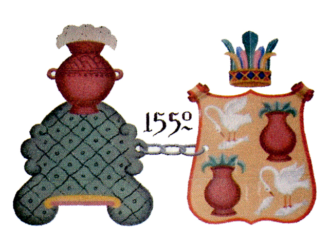 Escudo de Cuitzeo, Mich.